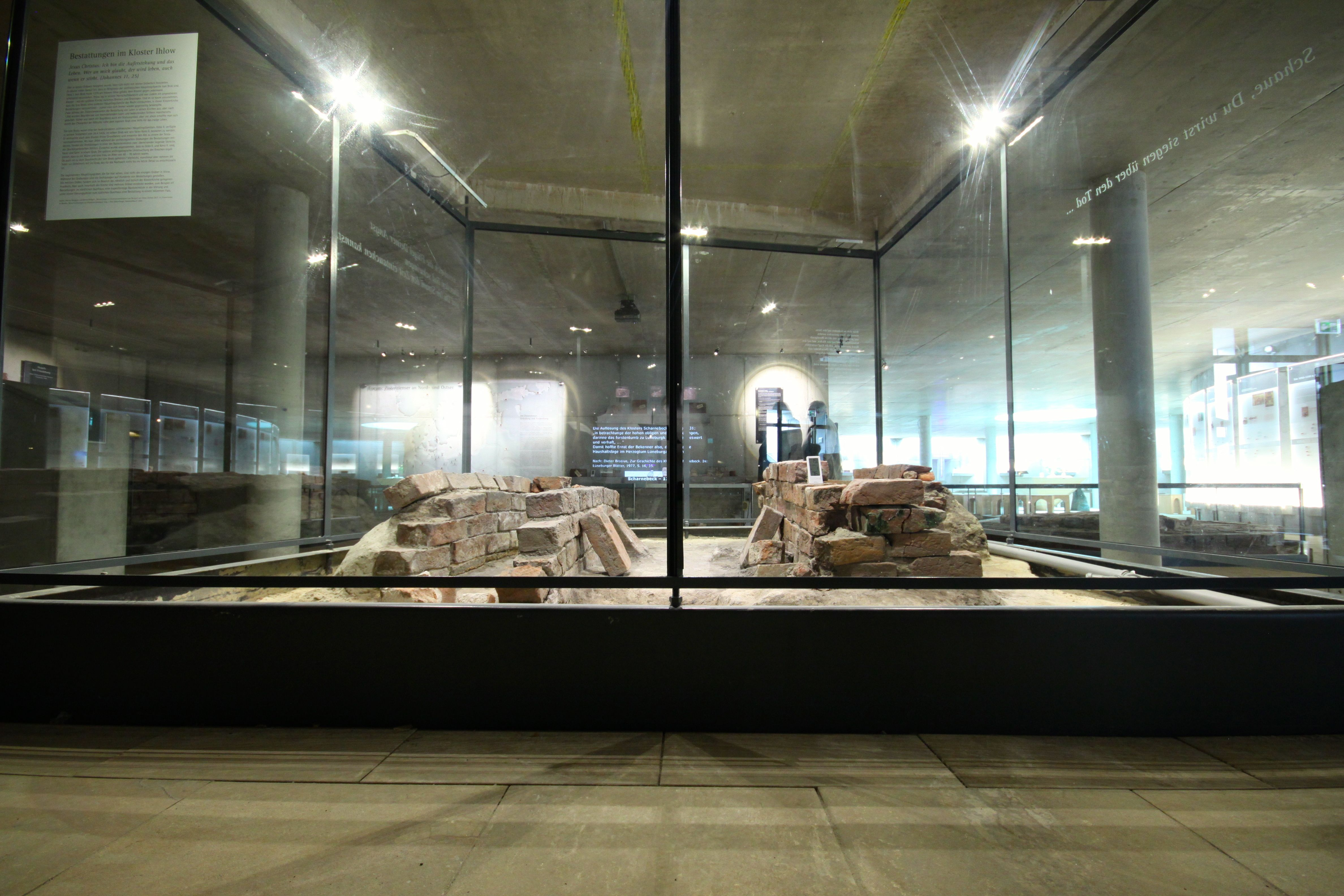 Raum der Spurensuche